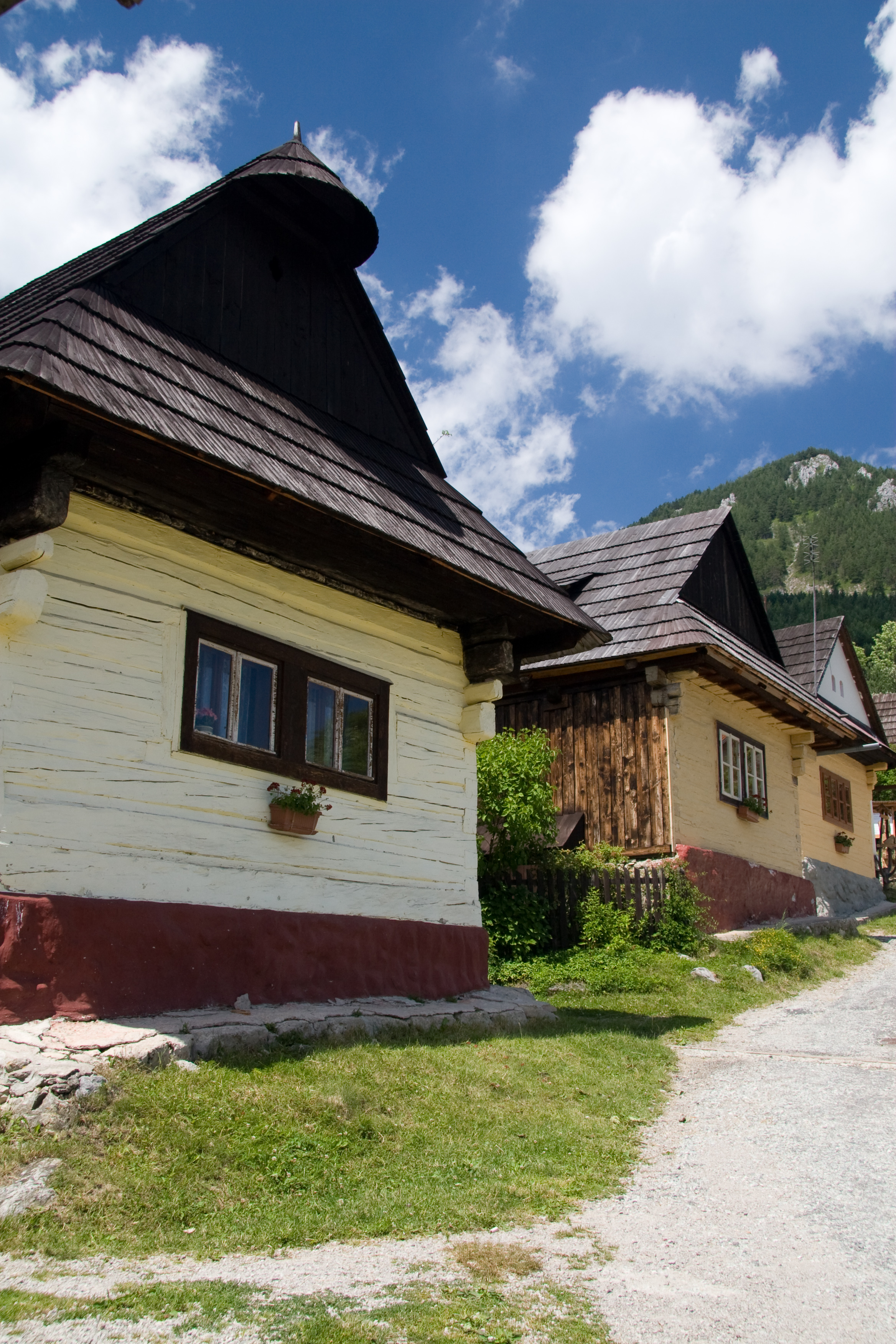 Vlkolínec, vľavo dom č. 9035